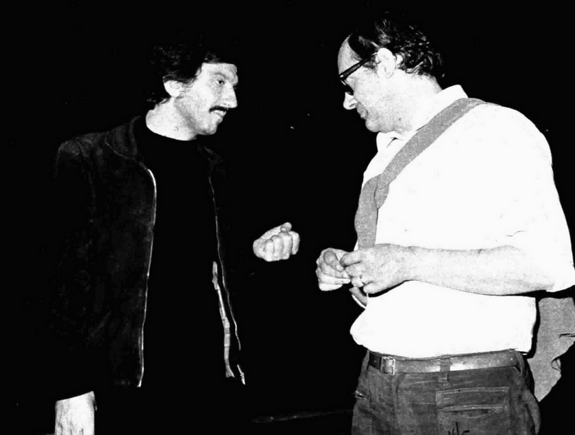 Italian actor Gigi Proietti and director Ugo Gregoretti